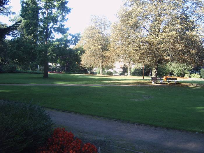 Park Bruchausen-Vilsen